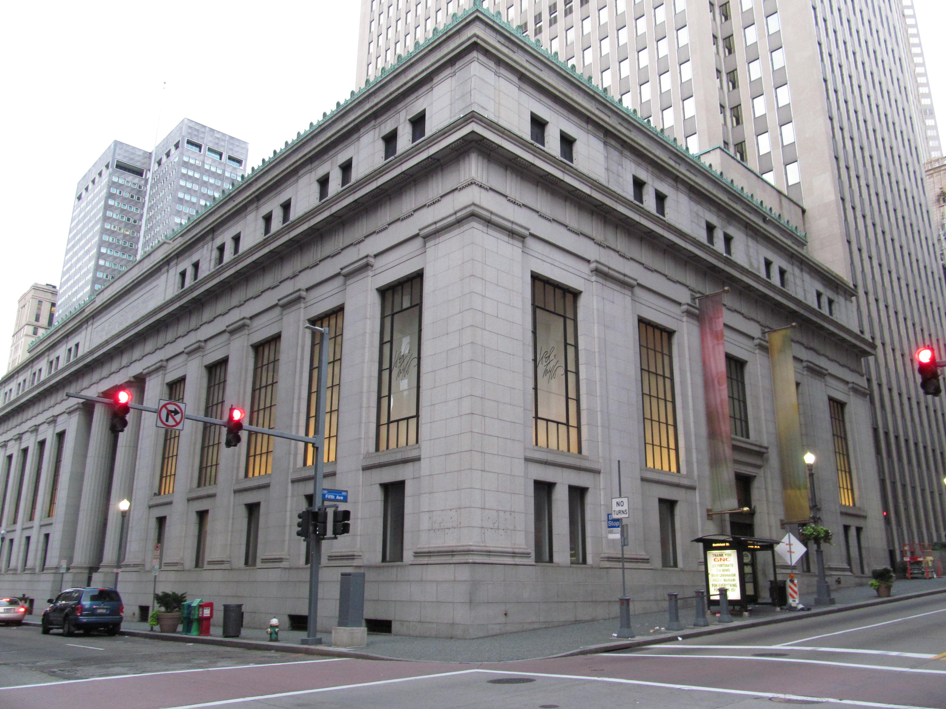 Pittsburgh, Pennsylvania